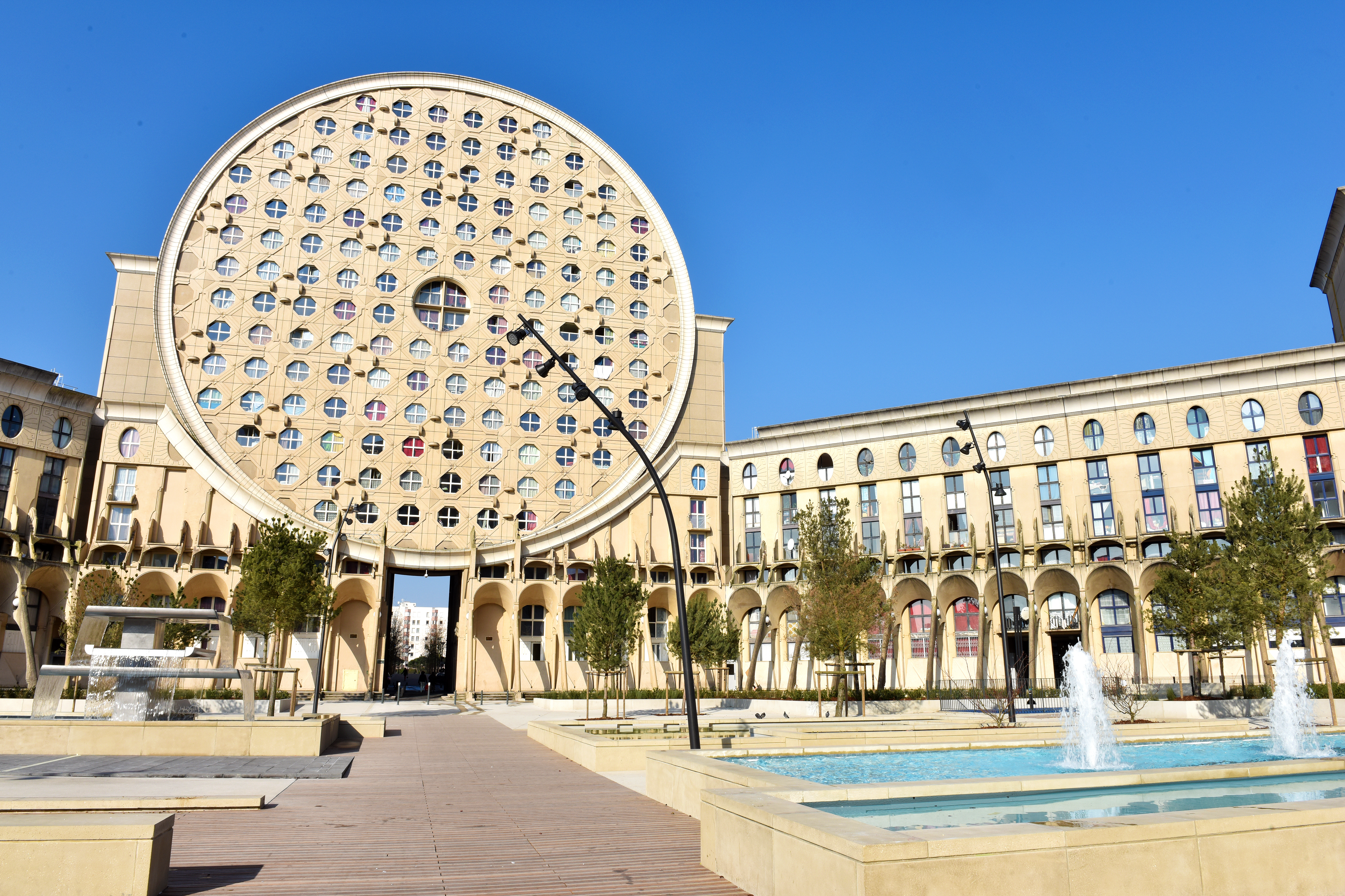 Les arènes Picasso et la nouvelle place Pablo Picasso inaugurée en avril 2015